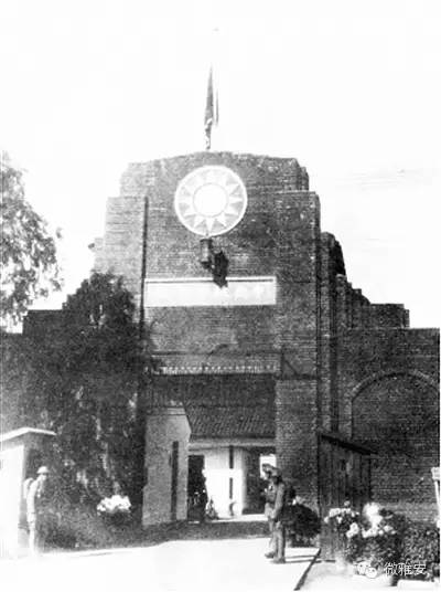 笕桥中央航空学校校门